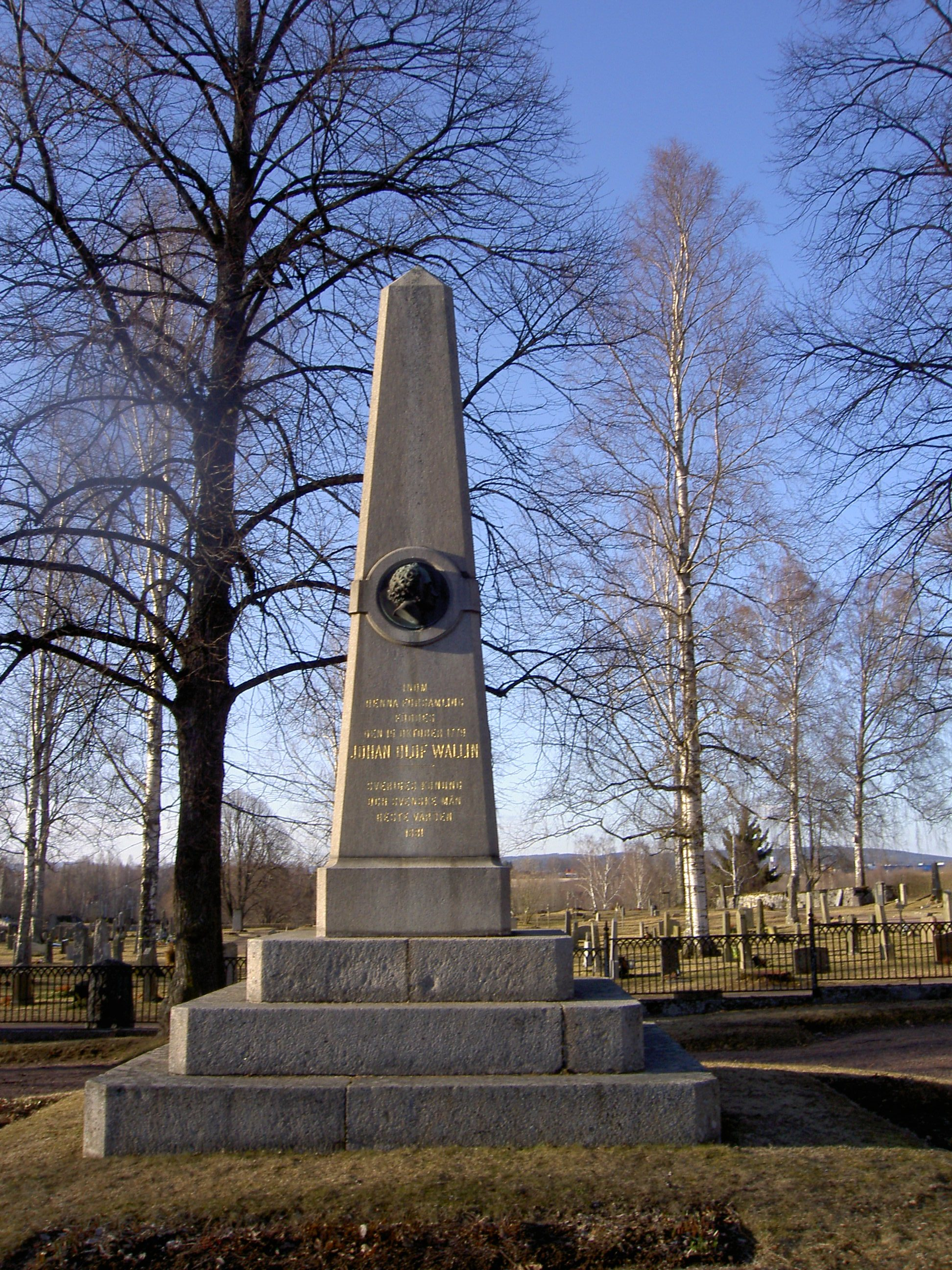 Minnessten över/memorial over Johan Olof Wallin, Stora Tuna kyrka, Stora Tuna, Sverige/Sweden